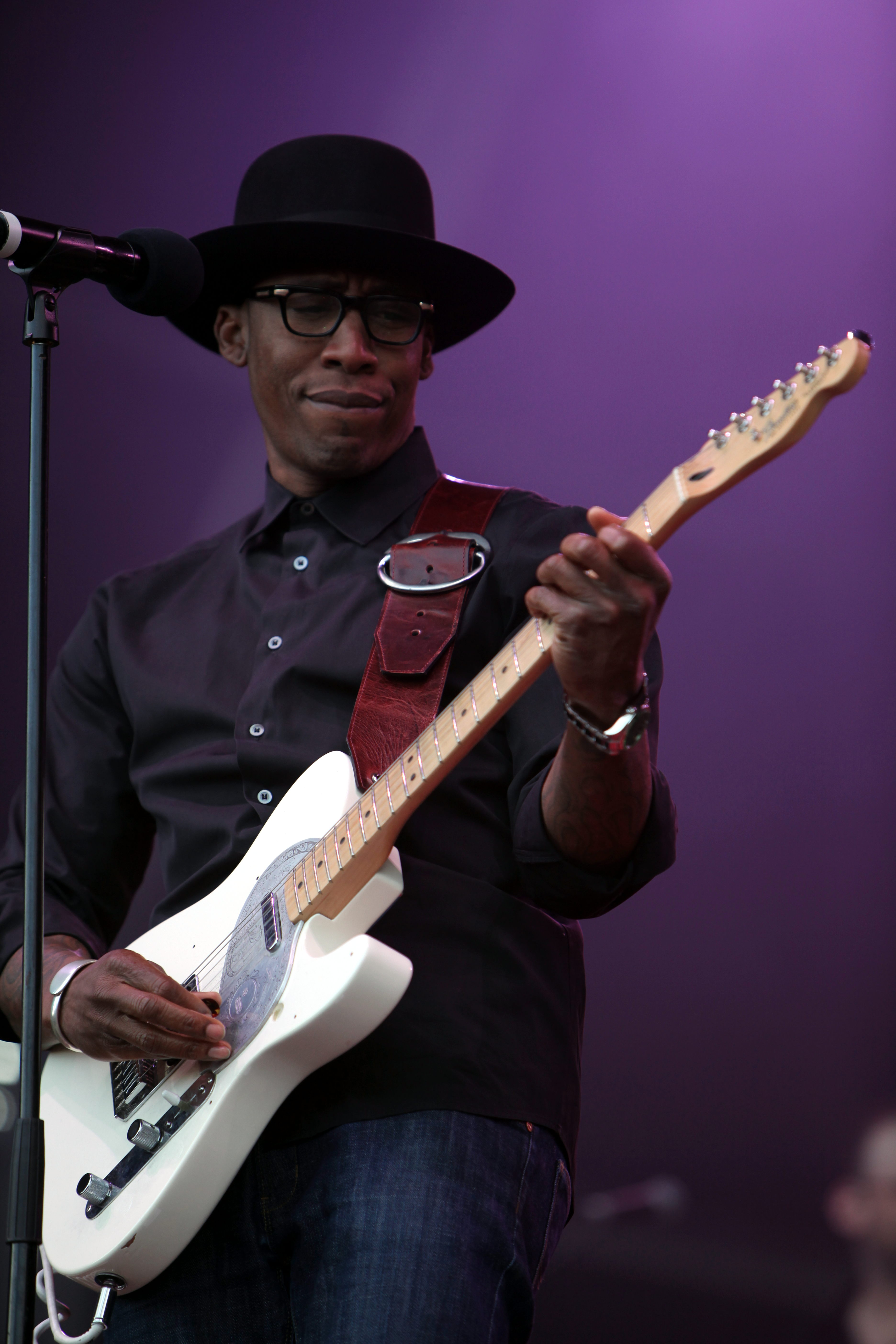 Raphael Saadiq at the Eurockéennes de Belfort 2011